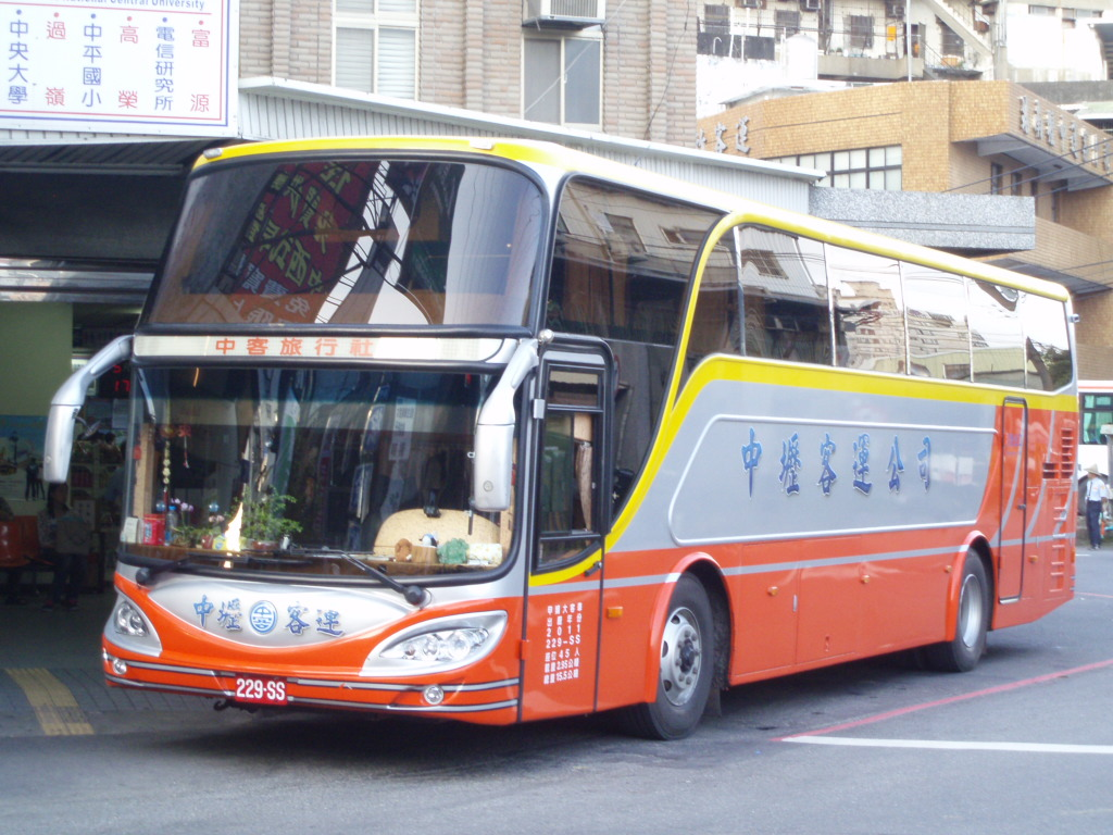 中壢客運2011年三菱扶桑RM11GNL3遊覽車229-SS。